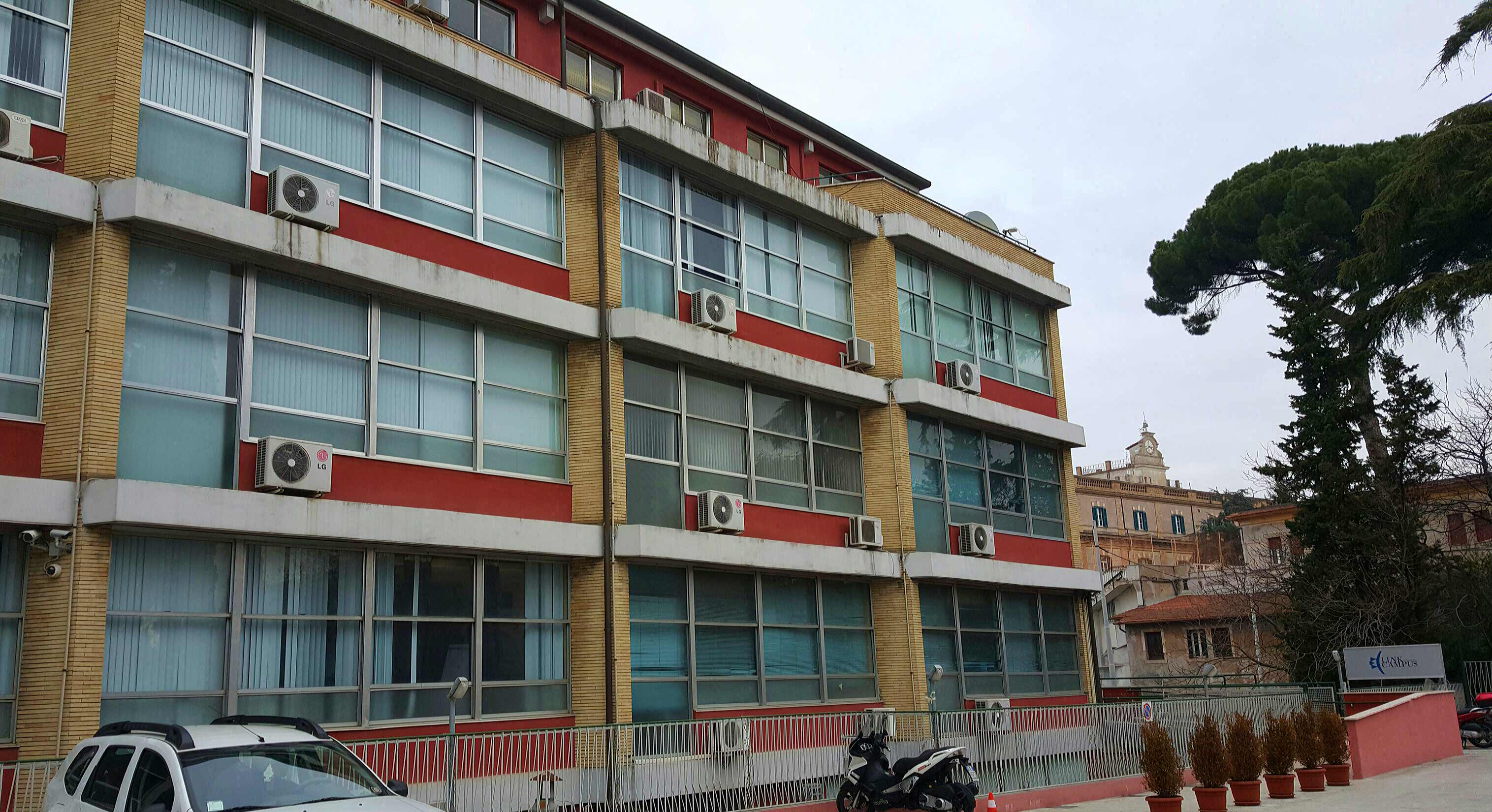 Università Link Campus a Roma